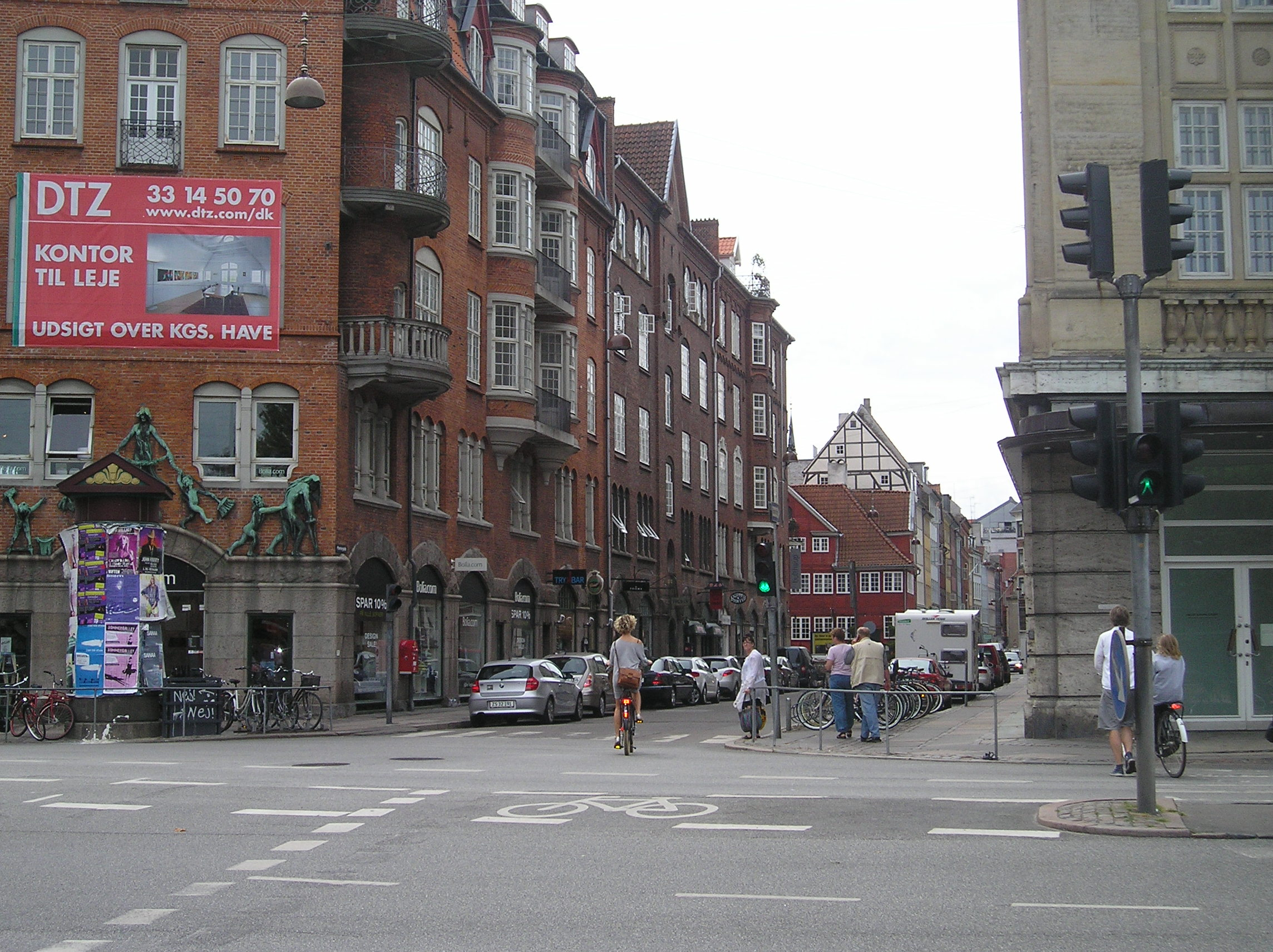 The street Møntergade in Copenhagen.